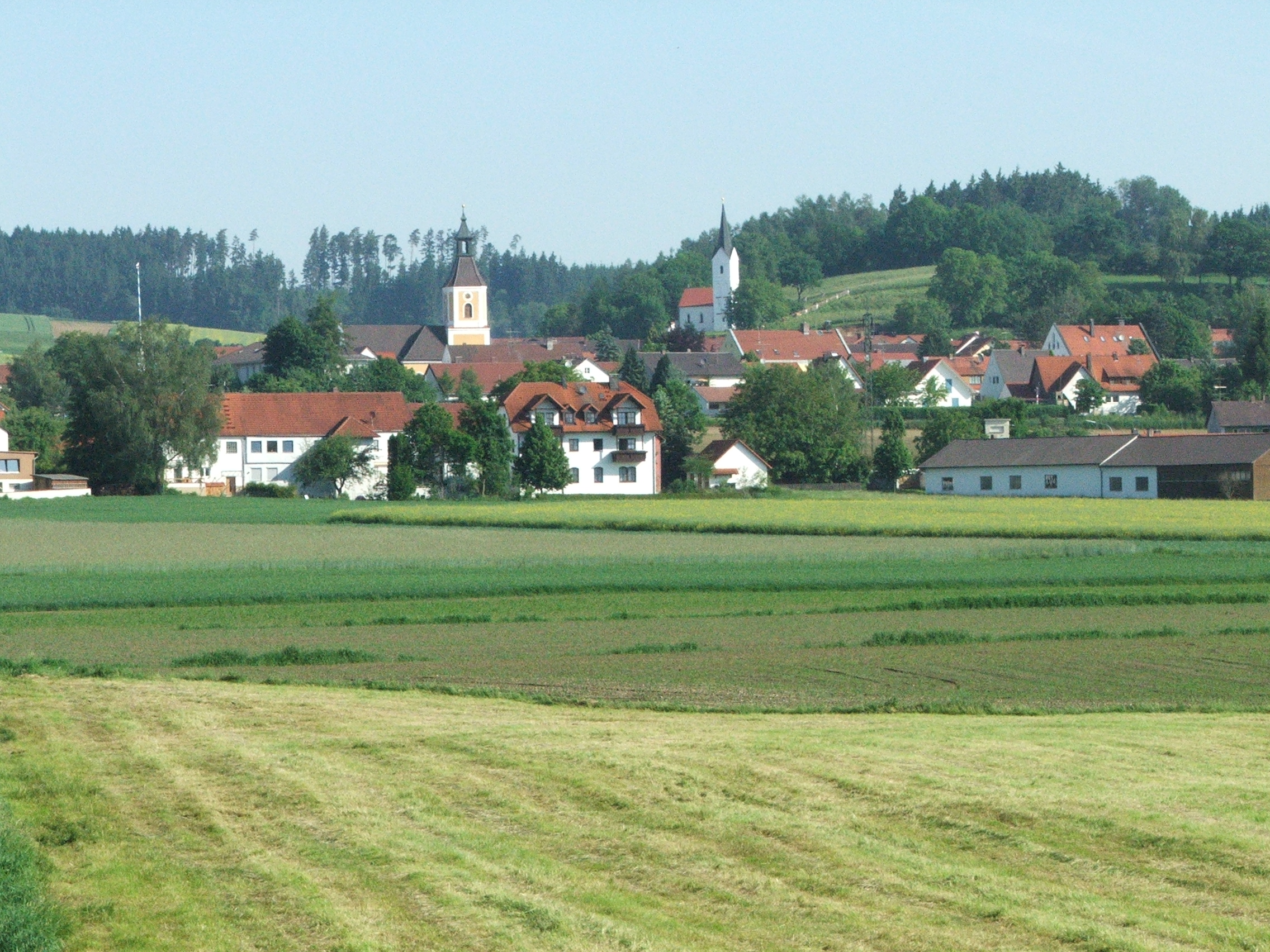 Blick auf Bruckberg mit der Pfarrkirche St. Jakobus, im Hintergrund die Nebenkirche St. Paulus